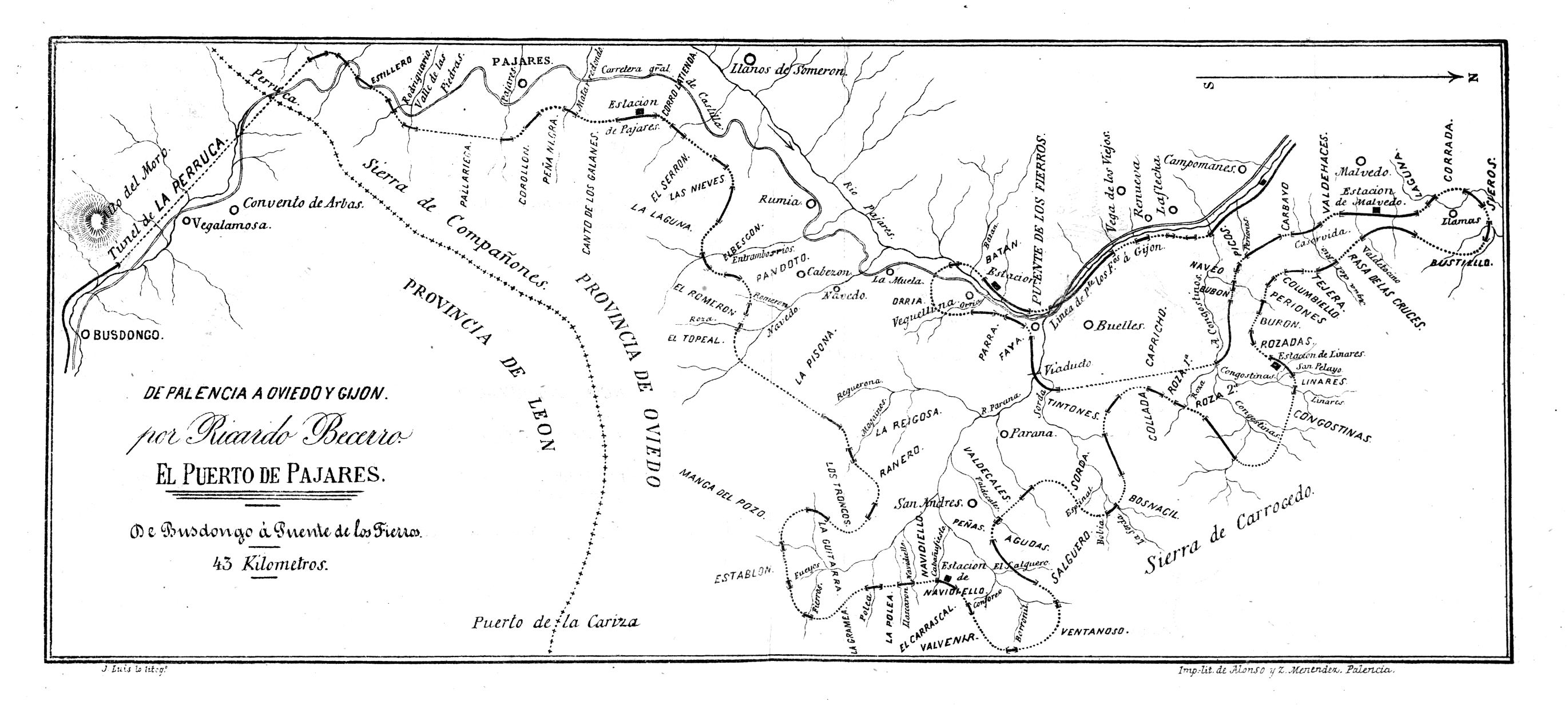 Plano de la línea de ferrocarril por el puerto de Pajares por Ricardo Becerro de Bengoa